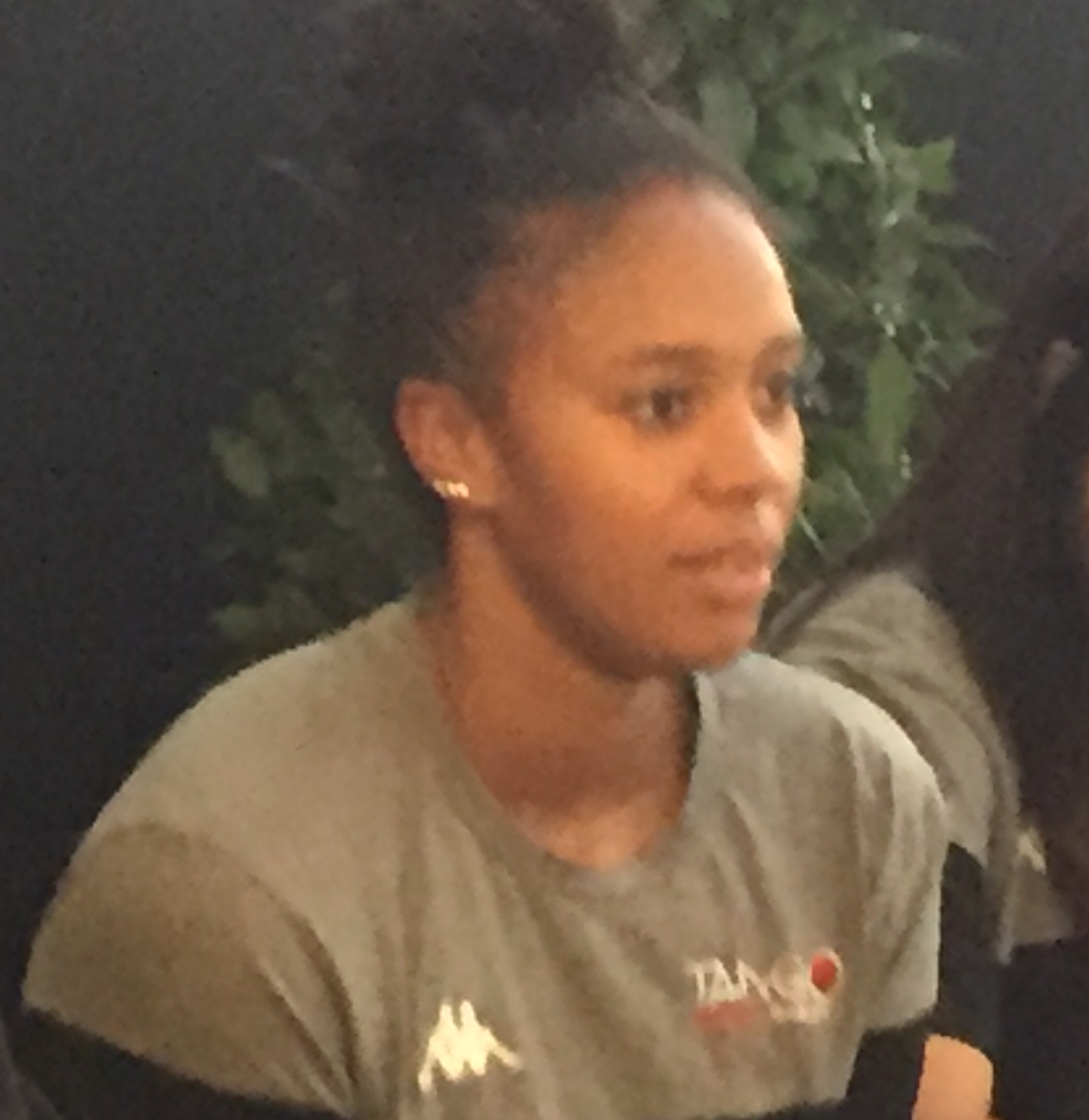 La basketteuse française Iliana Rupert en octobre 2018